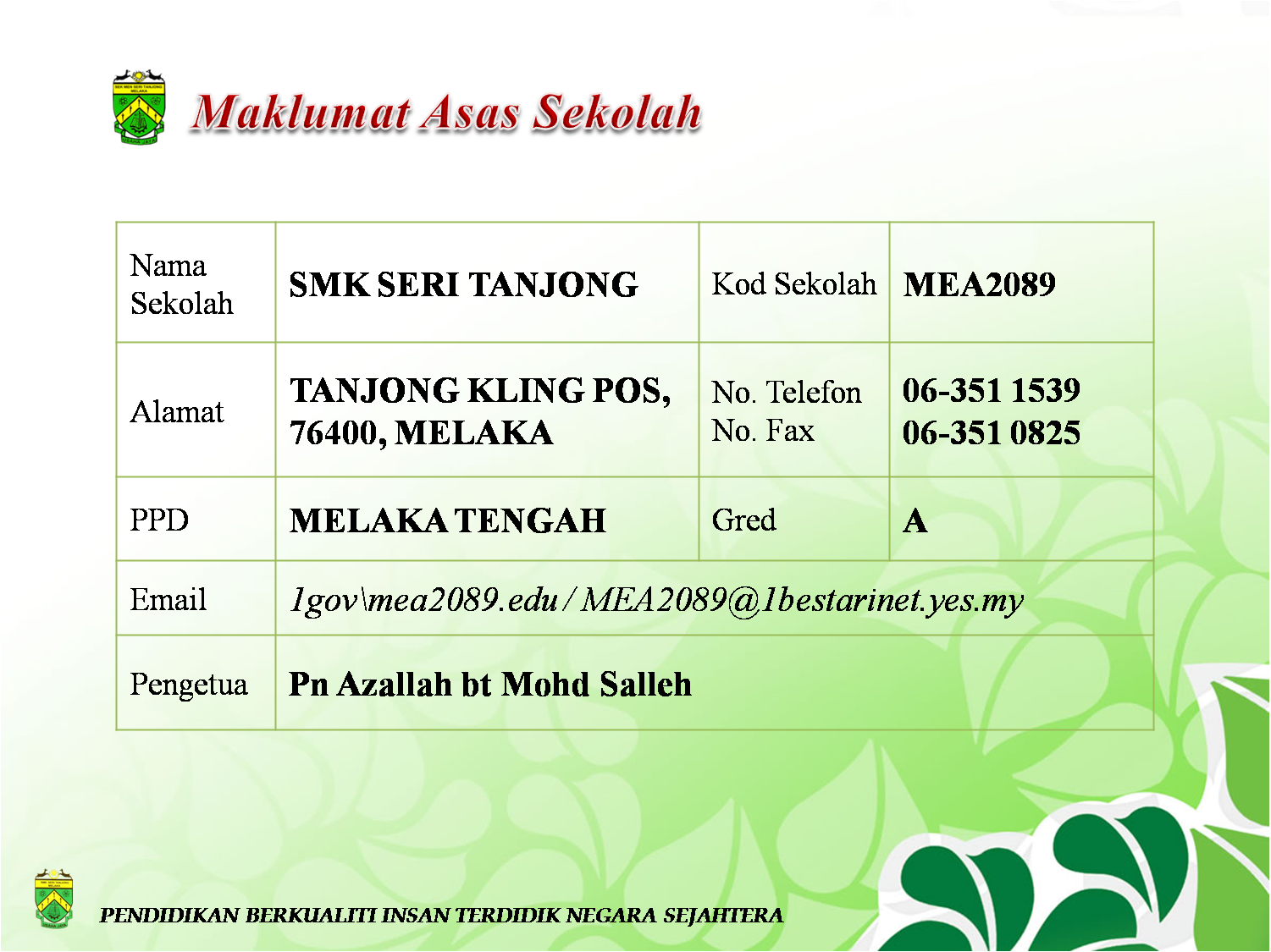 Maklumat Asas Sekolah